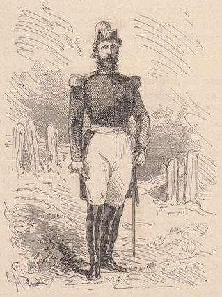 Le général Barrios, commandant de l'armée paraguayenne du Nord.